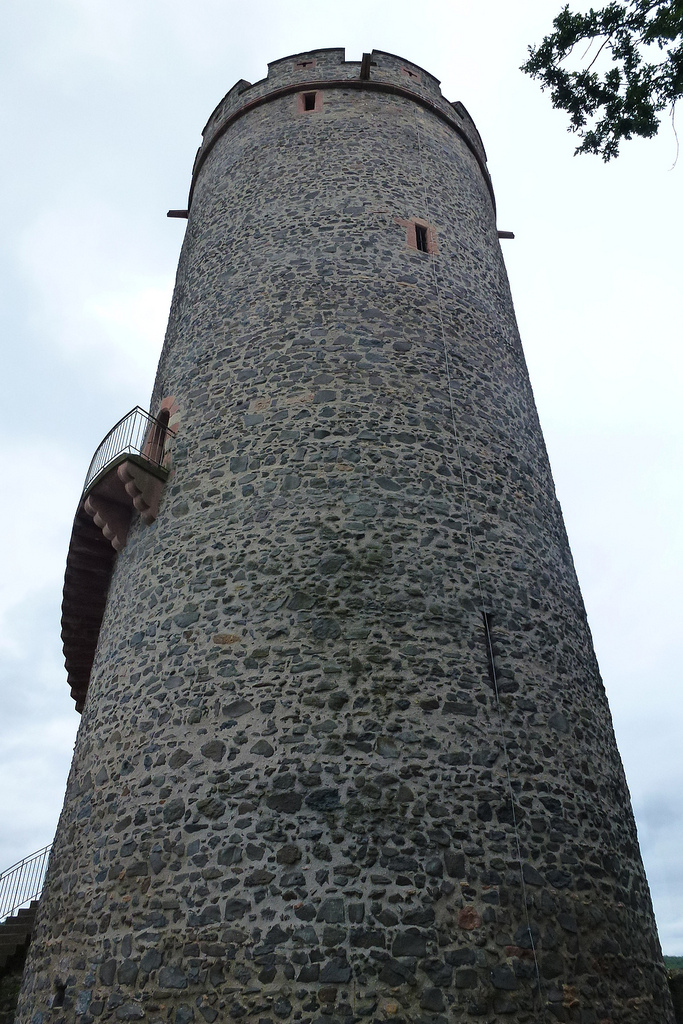 Der Burgturm der Burg Lißberg.